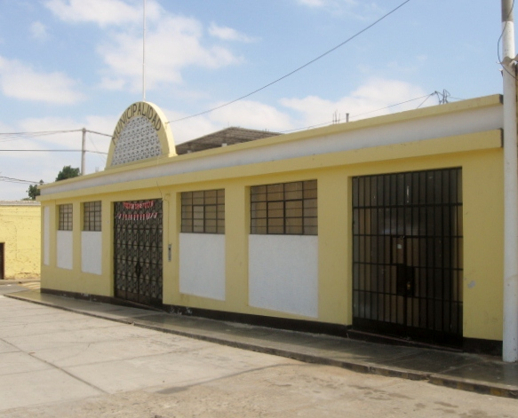 Municipalidad del Distrito de San Josè - Pacasmayo